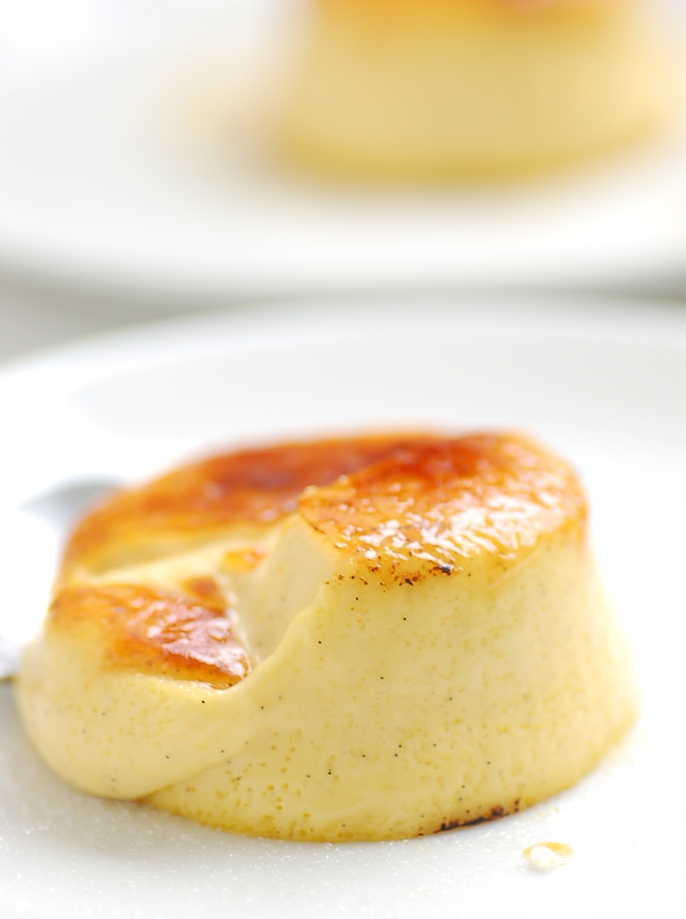 Vanilla crème brûlée.